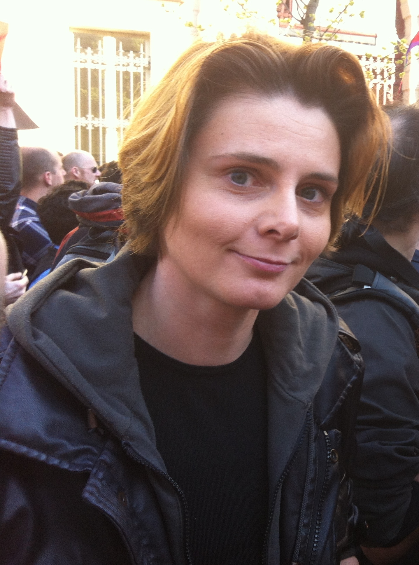 Caroline Fourest au rassemblement organisé par l'Inter-LGBT place Baudoyer à Paris pour fêter le vote de la loi instituant le mariage et l'adoption pour les couples de même sexe en France.